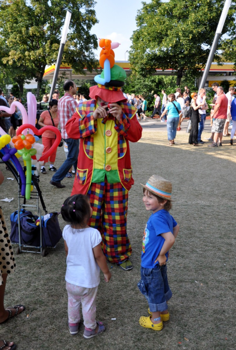 THAI Festival 2-7. Juli Kaiserwiese in Prater